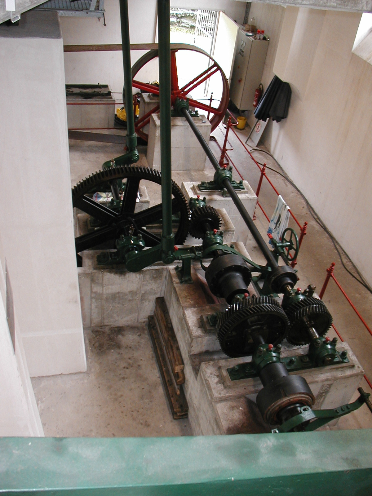 Wellenmaschine Antriebe UNDOSA